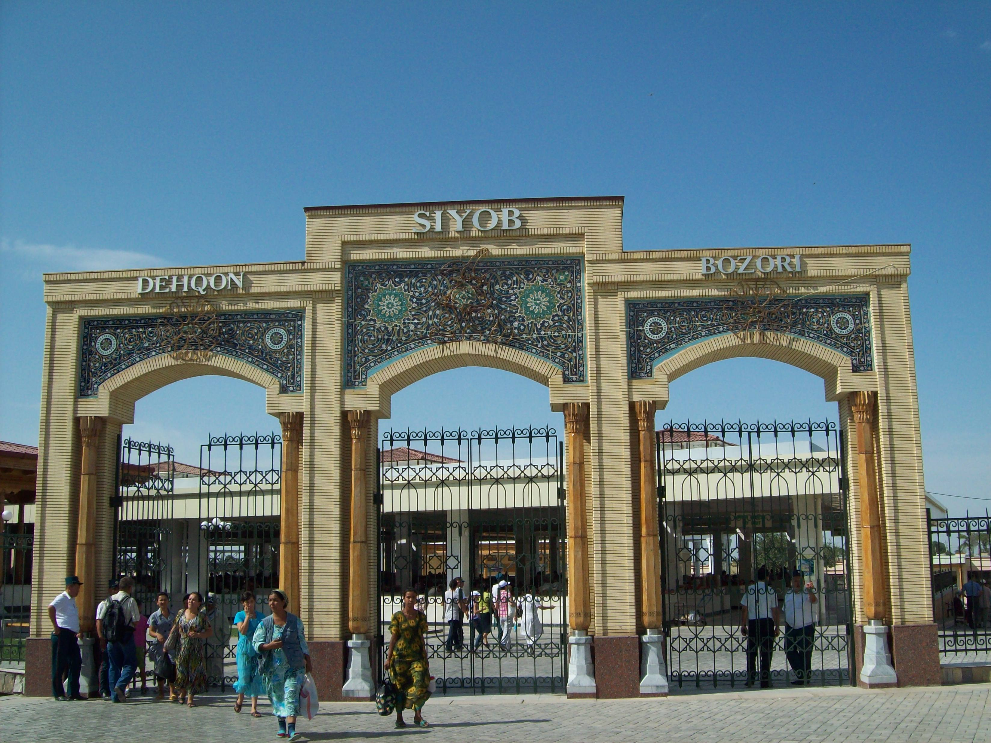 Сиябский базар (Самарканд, Узбекистан).